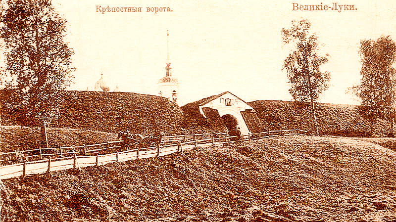 Великолукская крепость. Главные ворота.